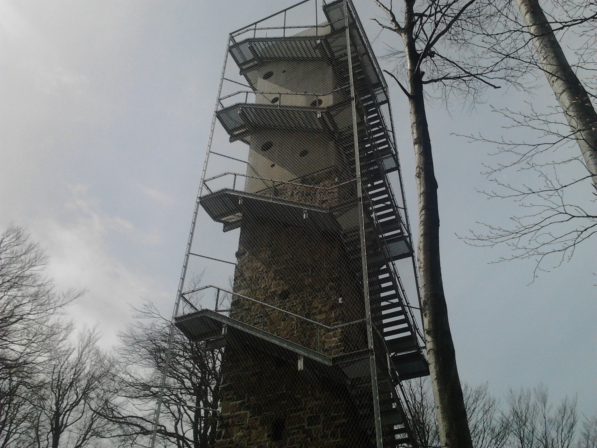 A felújított és 30 méter magasra bővített kilátó a Péter-hegyesén, a Galyatető közelében.